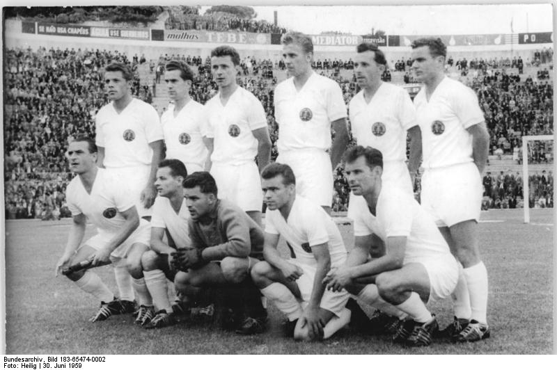 Zentralbild Hlg-Noa 30.6.1959 Fußballspiel DDR - Portugal in Porto. Am 28.6.1959 fand das Fußballrückspiel zwischen Portugal und der Deutschen Demokratischen Republik in Porto statt. UBz.: Von links nach rechts stehend: Heine, Kohle, Erler, Müller, Wolf, Wagner. Schröter, Ducke, Thiele, Vogt, Unger.